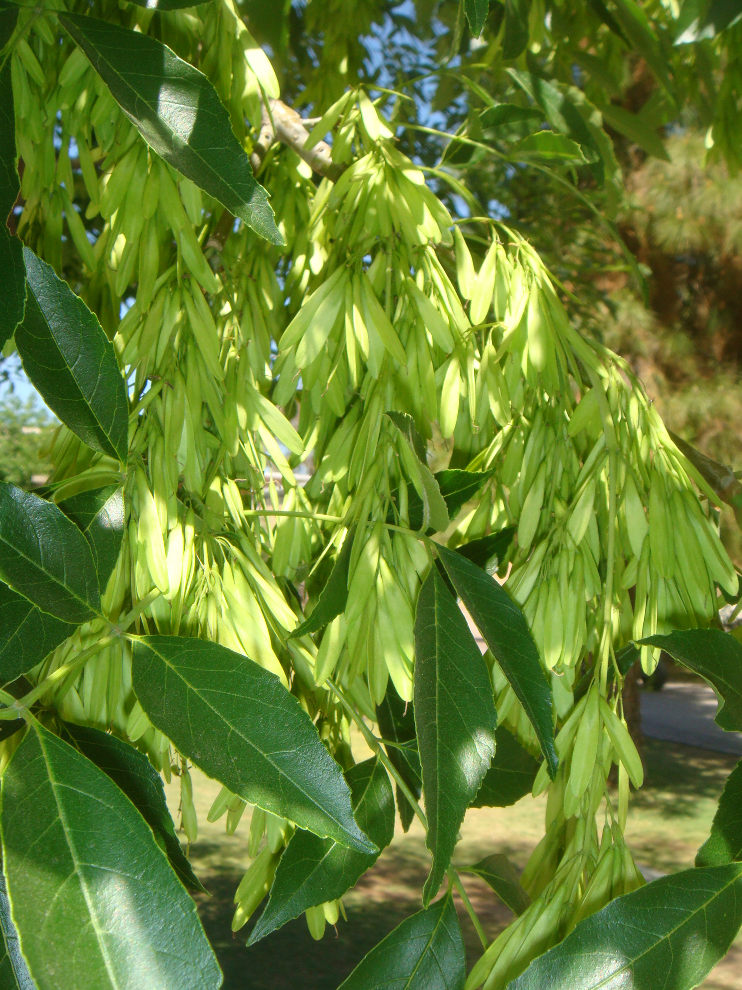 Fraxinus velutina, cultivated, Arizona State University, Tempe, Arizona